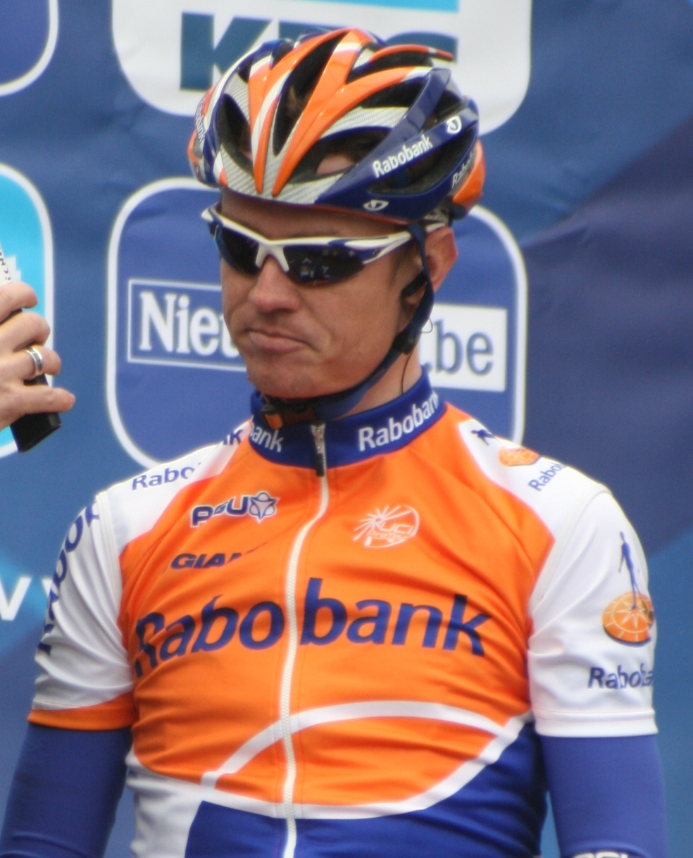 Nick Nuyens, au départ du Tour des Flandres 2009